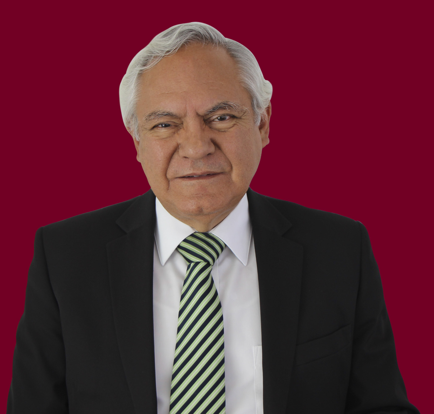 Profesor Ramón Jiménez López estudió la Maestría en Matemáticas Educativas en el Centro de Investigaciones y Estudios Avanzados (CINVESTAV), del Instituto Politécnico Nacional, donde también dio clases por 35 años. Para 2001, realizó otra Maestría en Economía, también en el Politécnico.